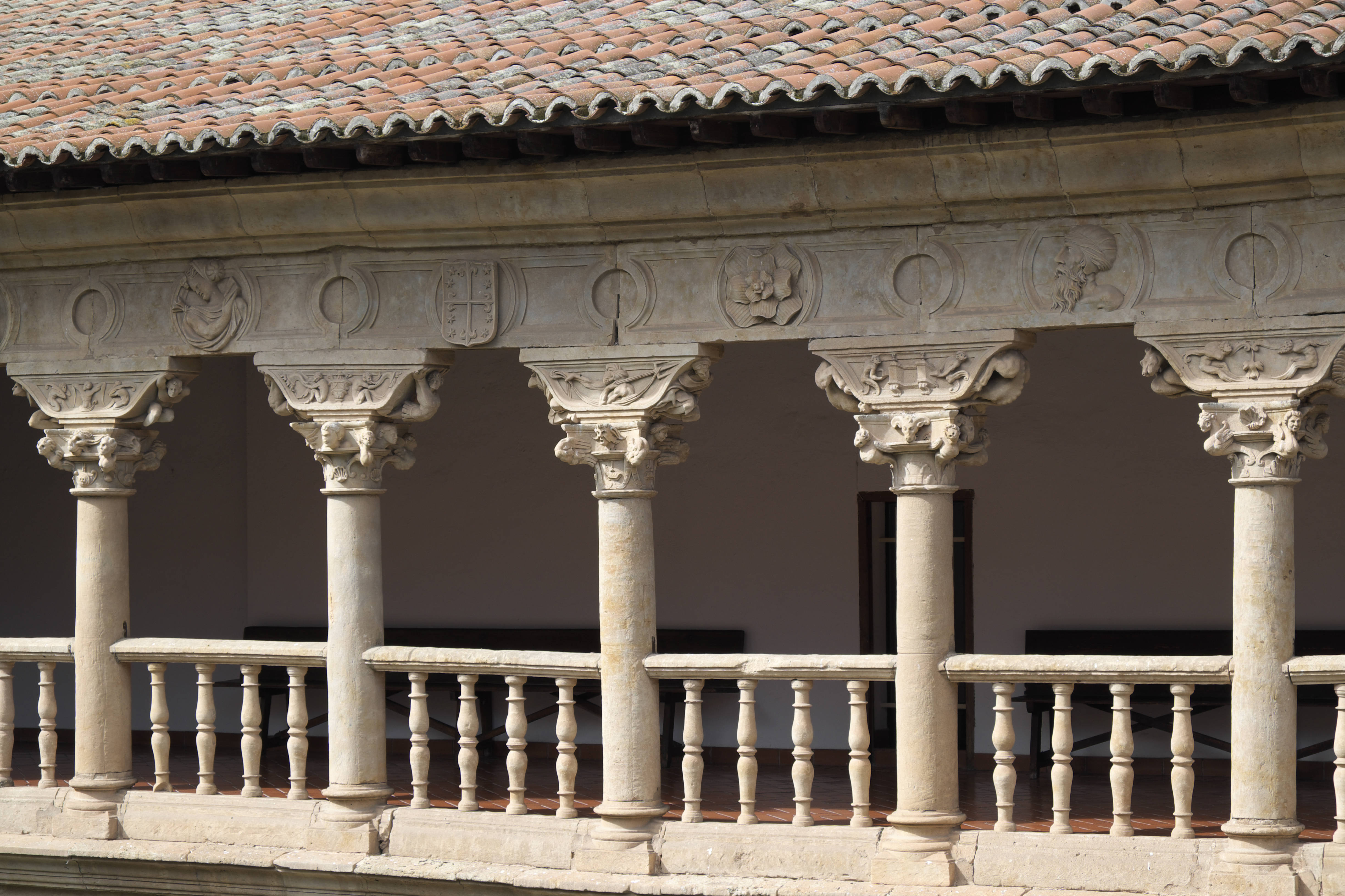 Dominikanerinnenkloster Convento de las Dueñas in Salamanca (Kastilien-León/Spanien), Kreuzgang